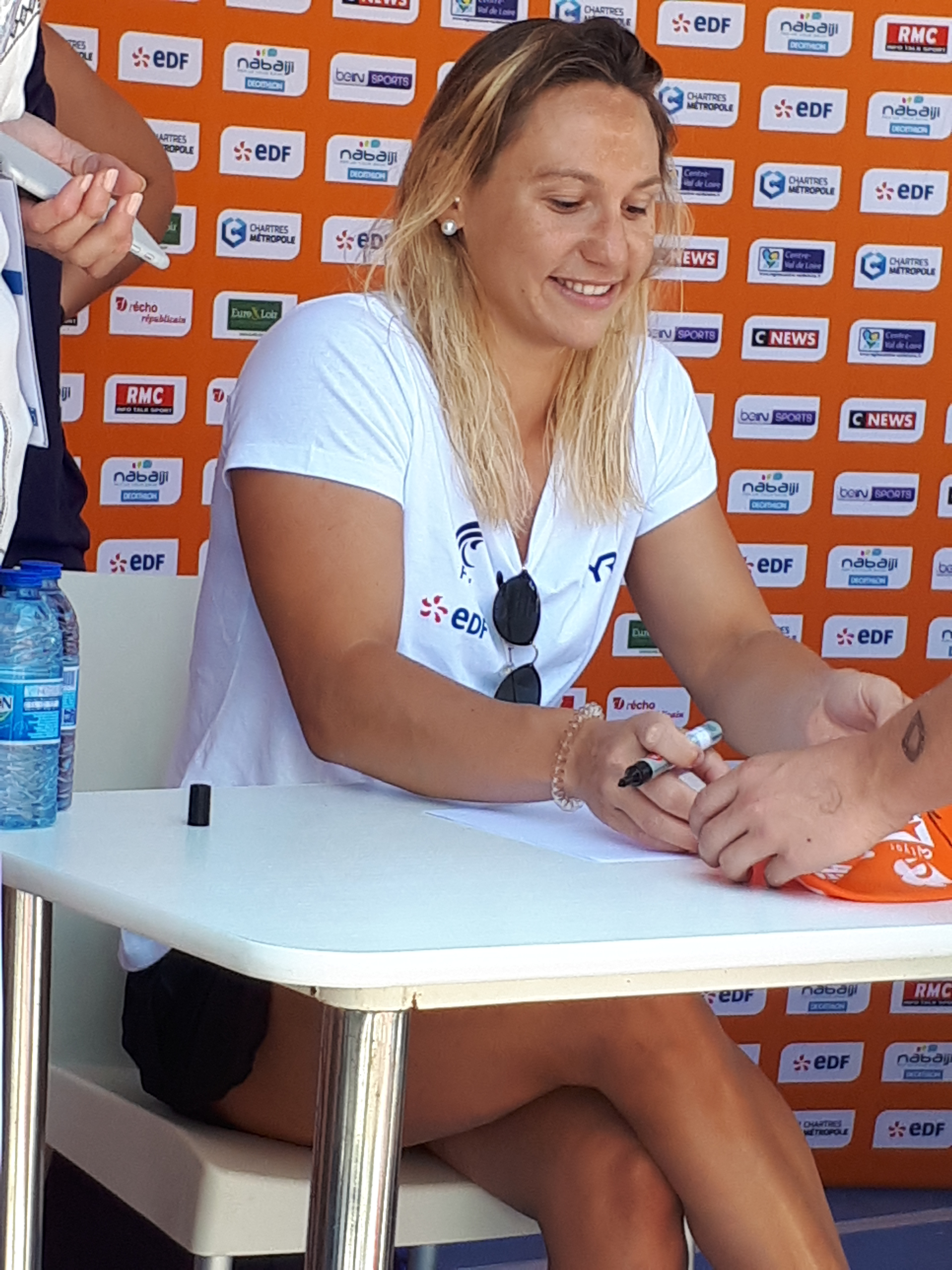 Open de France de Natation 2018 à Chartres. Mathilde Cini pendant la séance de dédicaces.